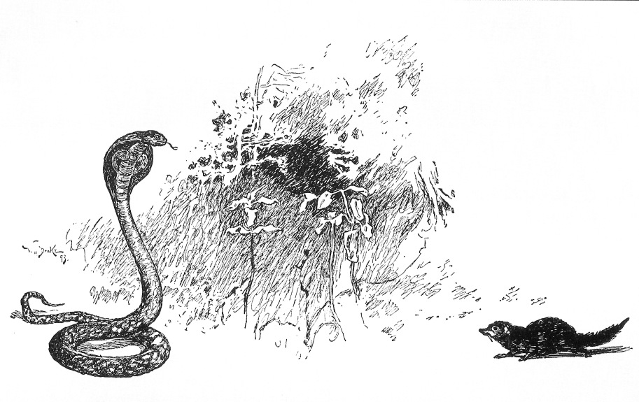 "Rikki-tikki-tavi confronts Nag"